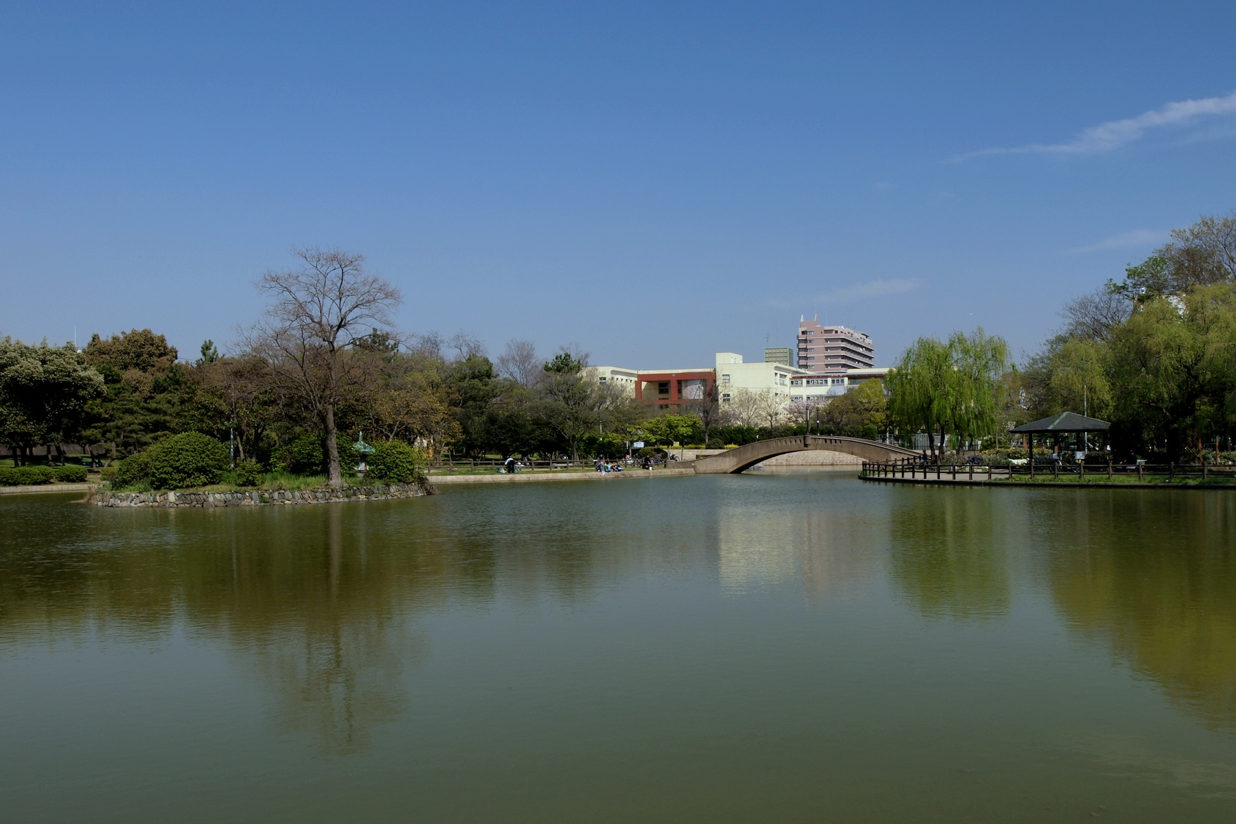 住之江公園 大池 所在地：大阪府大阪市住之江区南加賀屋